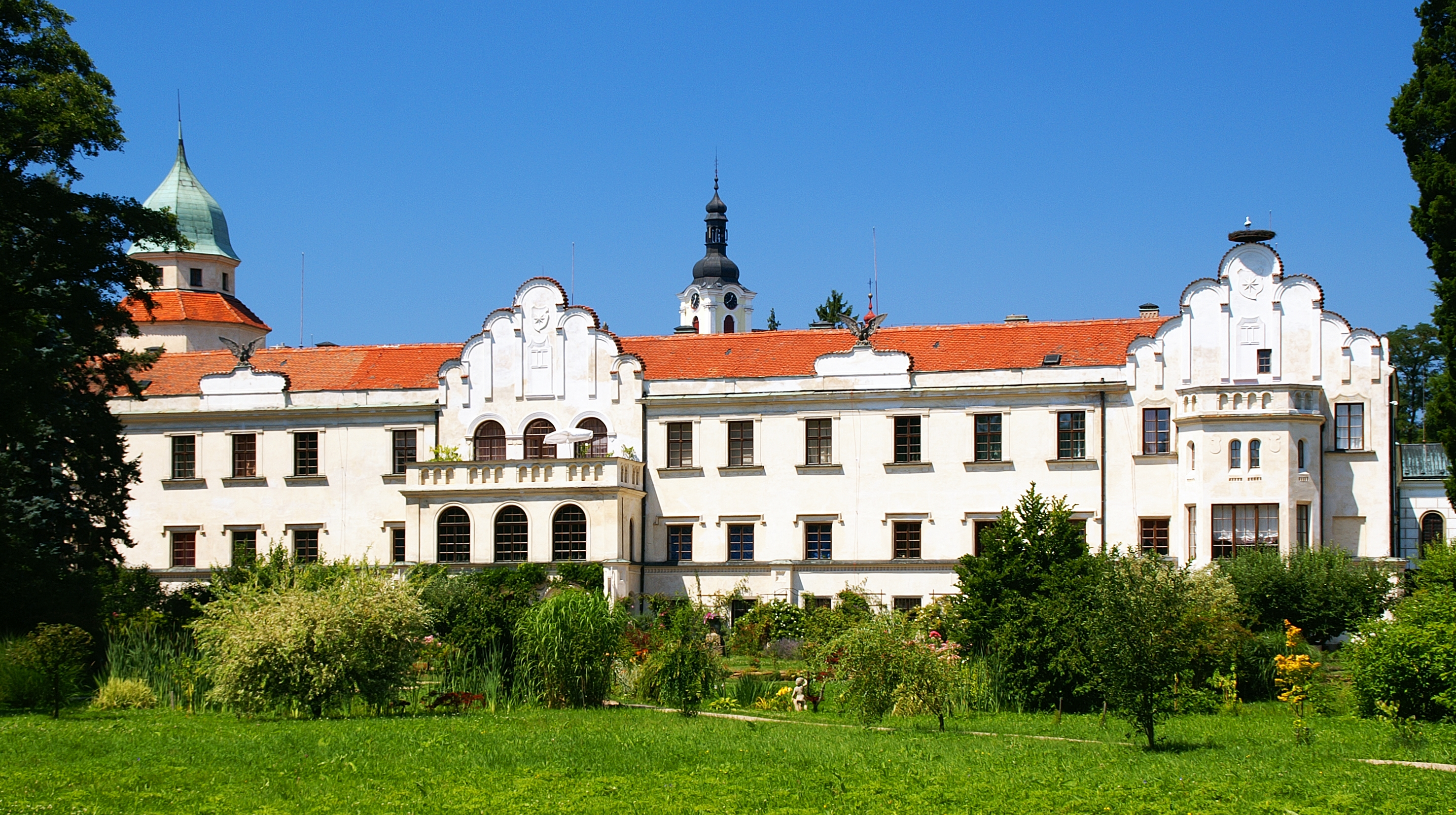 Zámek v Častolovicích u Rychnova nad Kněžnou.